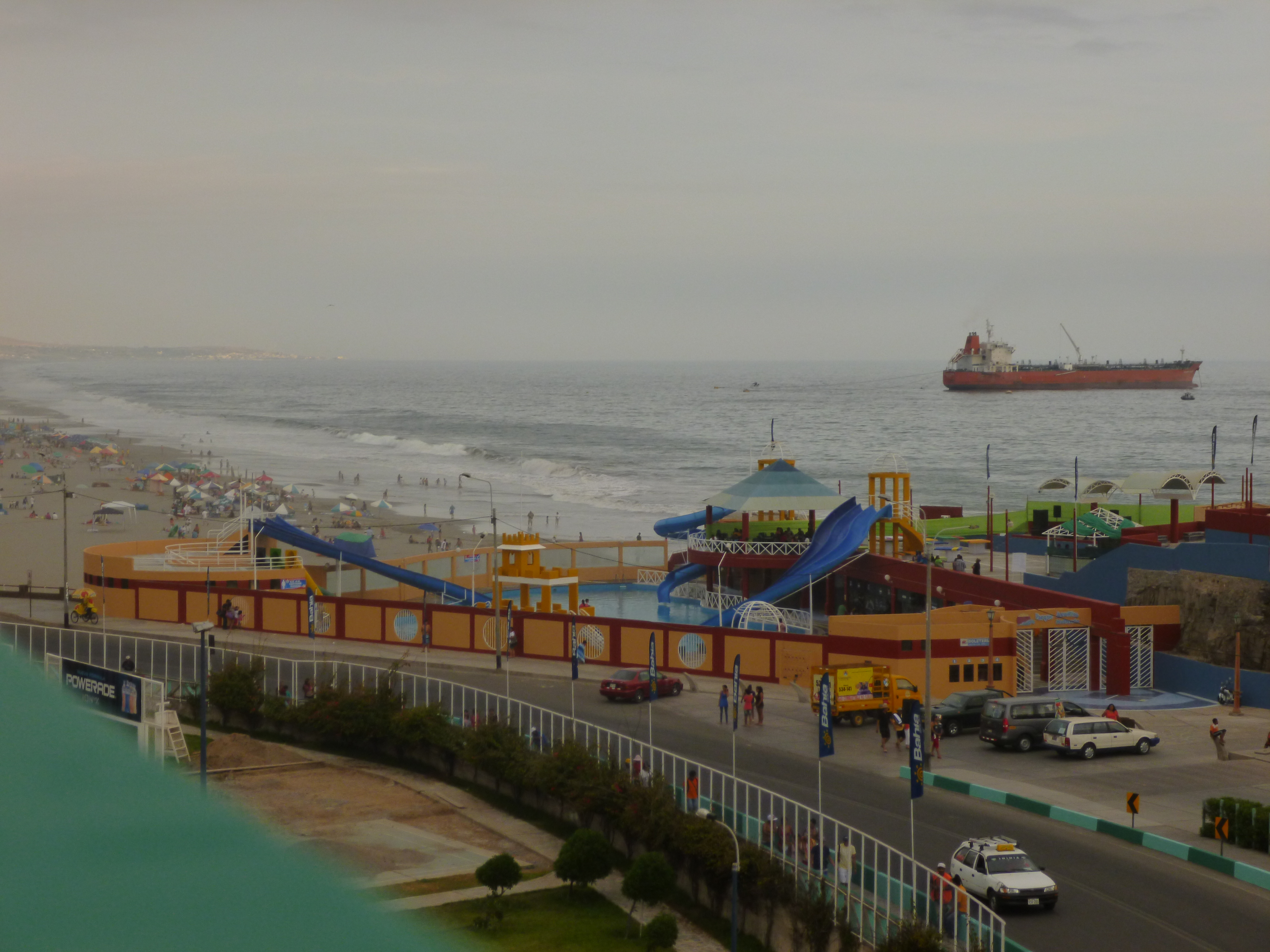 Parque Acuático de la ciudad de Mollendo, Tomada desde el malecón Ratti.